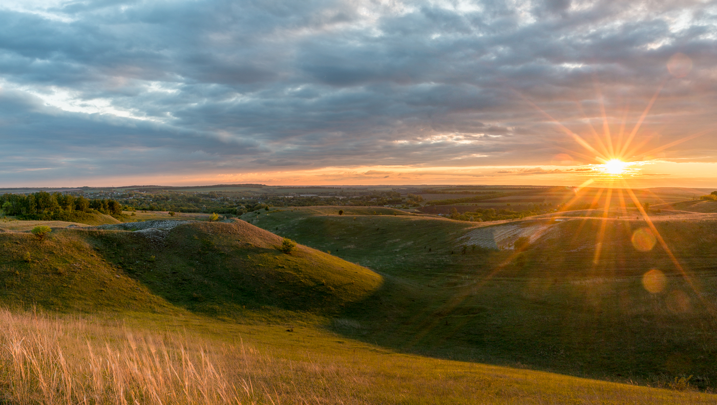 Землянский заказник: Семилукский район, Воронежская область This image is related to the protected area of Russia number 3610207